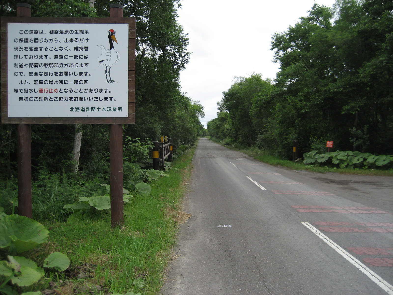 北海道道1060号クチョロ原野塘路線 コッタロ第一展望台入口（ダート開始ゲート）